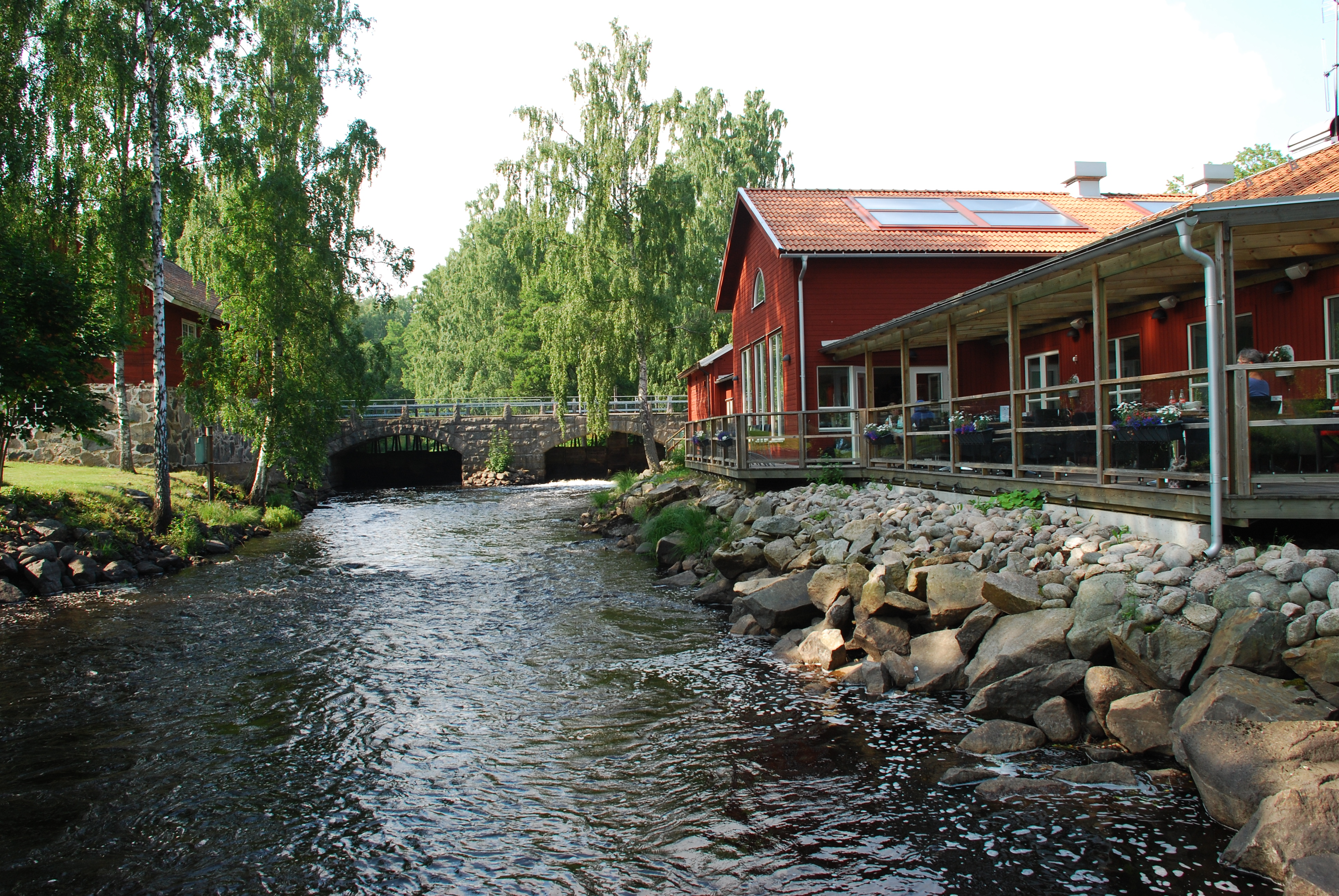 Ronnebyän vid Korrö